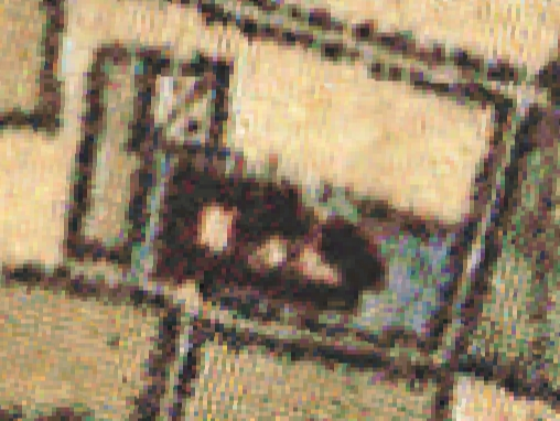 vergrößerteer Auszug der Burg Gillrath aus einer historischen Karte von Tranchot